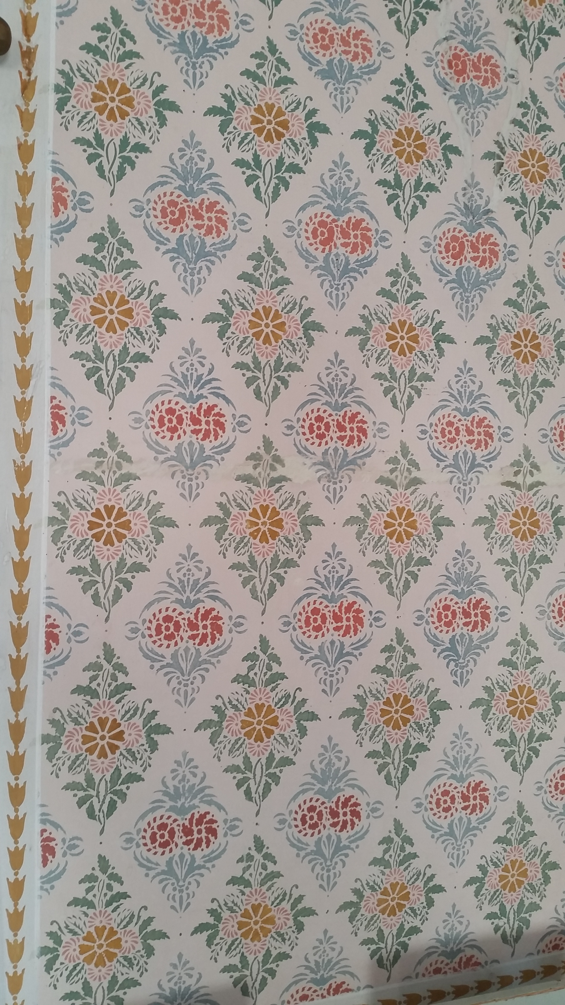 Schablonmålning från Gästgivars och förlaga till Gästgivarstapeten.